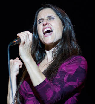 Arlette Jequier cantante chilena de destacados grupos de fusión de Chile tales como Fulano, Mediabanda, y su proyecto solista.